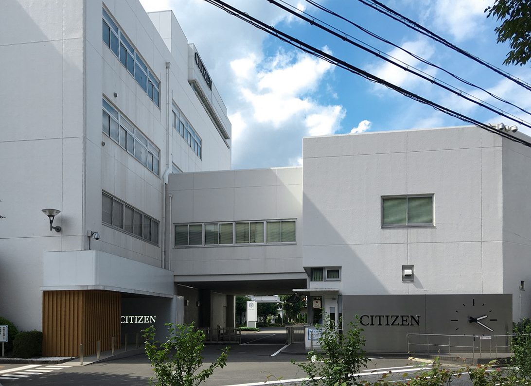 シチズン時計本社・田無工場